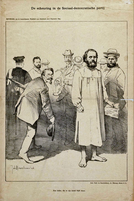 Prent ter illustratie van de scheuring in de Sociaal-Democratische Partij; op de voorgrond links Jan Fortuijn en rechts Ferdinand Domela Nieuwenhuis, op de achtergrond vlnr Pieter Jelles Troelstra, Vitus Bruinsma, Frank van der Goes, Willem Helsdingen en Rindert van Zinderen Bakker